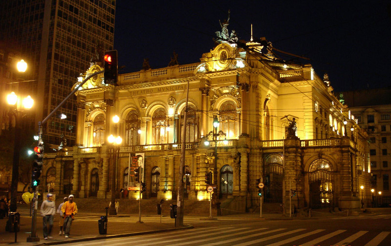 Teatro Municipal da cidade de São Paulo, Brasil.